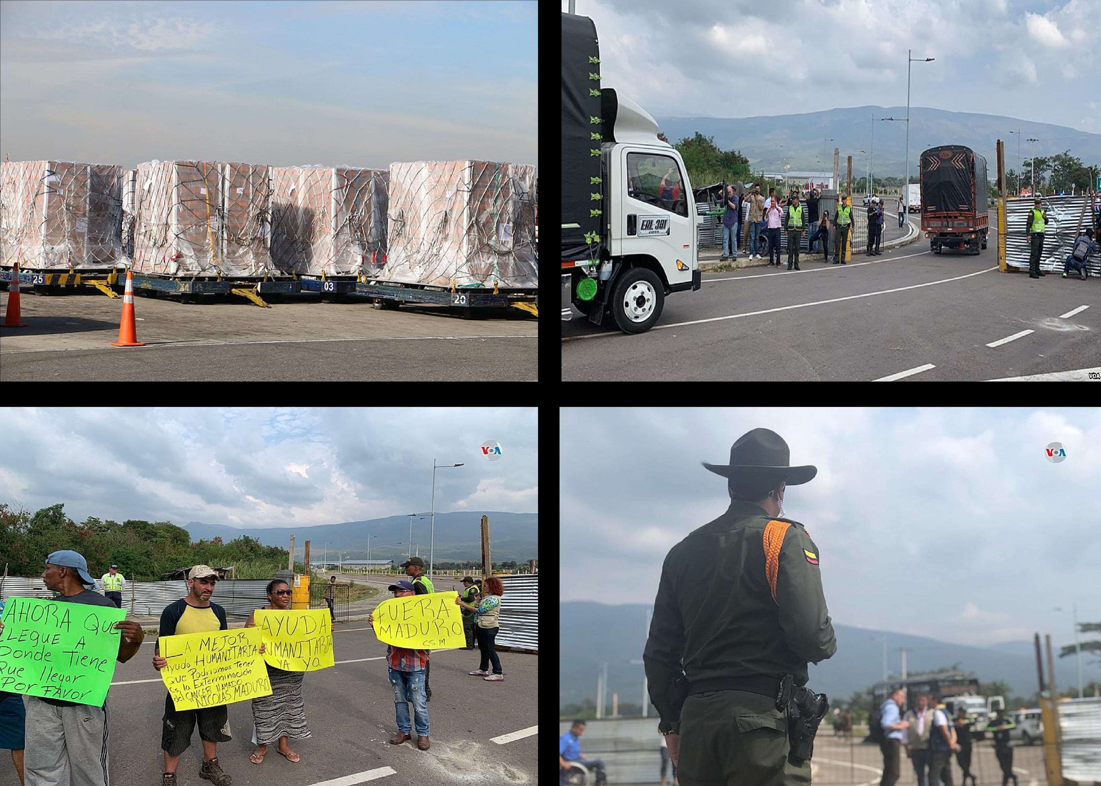 Ayuda humanitaria a Venezuela desde Colombia.